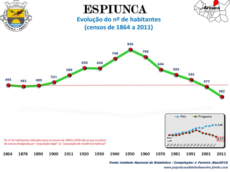 Evolução da População 1864 / 2011